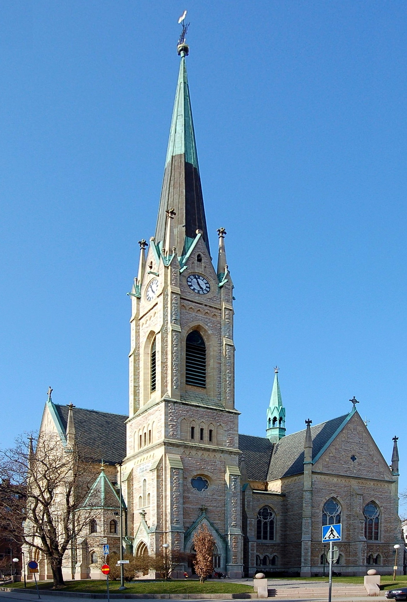 Oscarskyrkan i Stockholm södervy